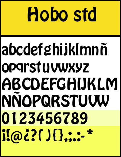 Caracters tipografics de la Hobo std